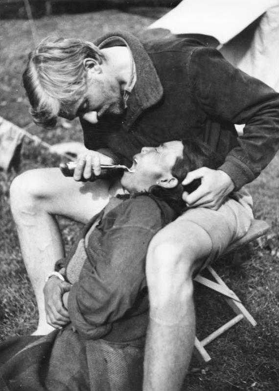 Tibetexpediton, Anthropometrische Untersuchungen Lachen, Beger als Zahnarzt [Anthropometrie, Kraniometrie] Abgebildete Personen: Beger, Bruno Dr.: SS-Hauptsturmführer, Abteilungsleiter Sven-Hedin-Institut, Deutschland (GND 128720654)